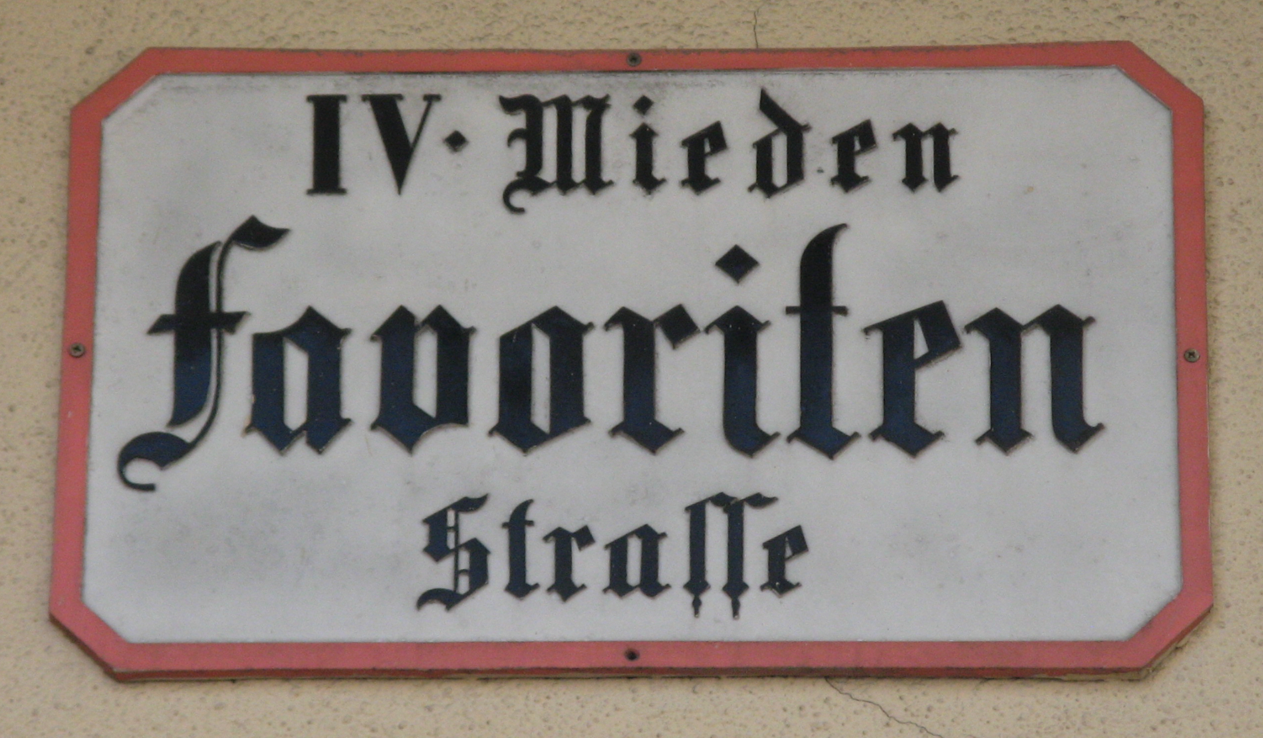 Historisches Straßenschild Favoritenstraße, Wien-Wieden